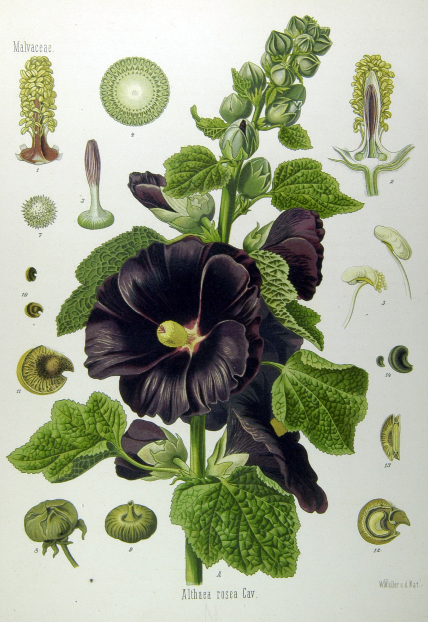 Planche botanique n° I-19 de l'"Atlas des Plantes médicinales de Köhler en images réalistes avec brèves notes explicatives" consacrée à la rose trémière.